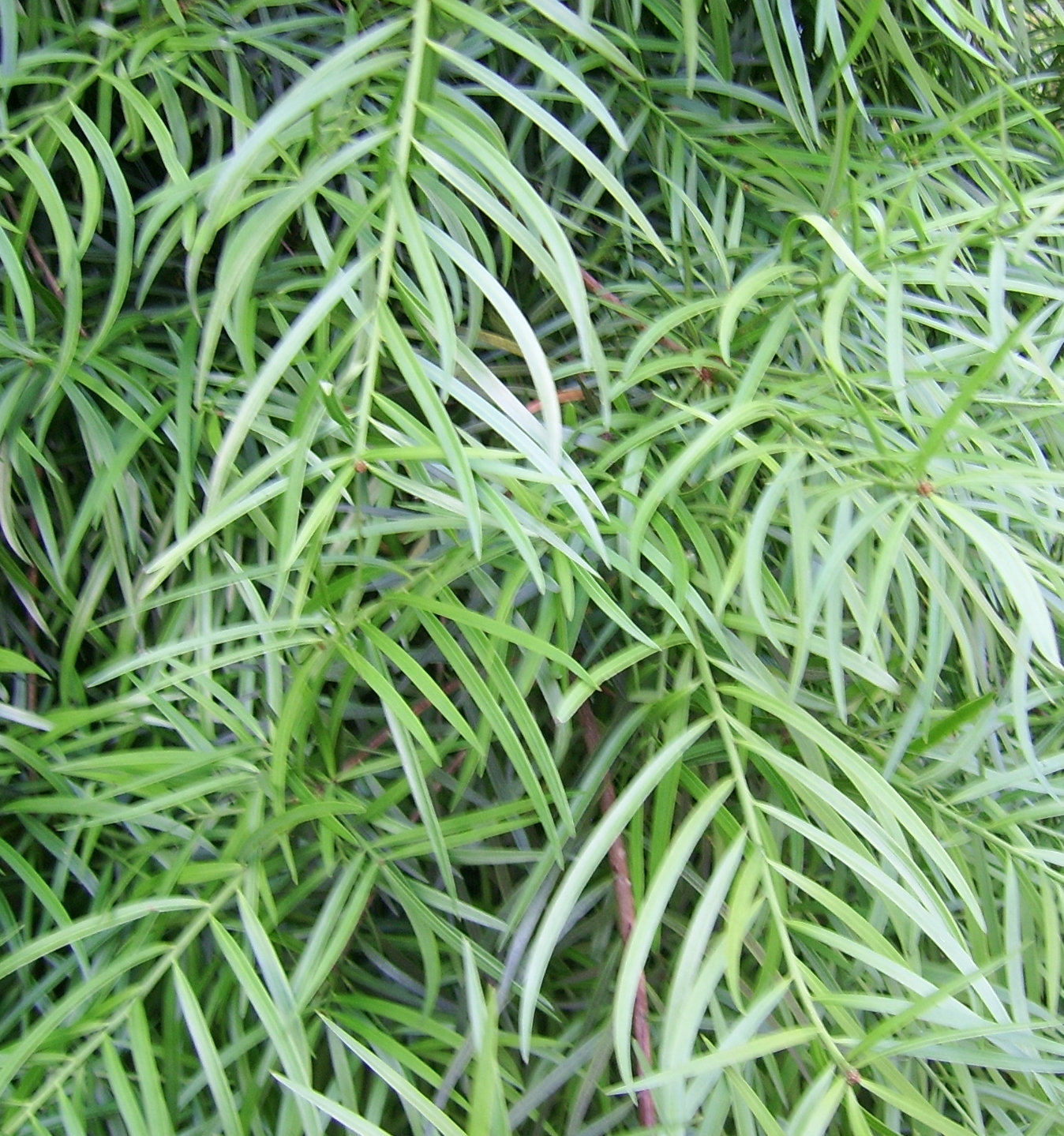 Follaje del Mañío de hojas largas Podocarpus salignus, Isla Teja, Valdivia, Chile.